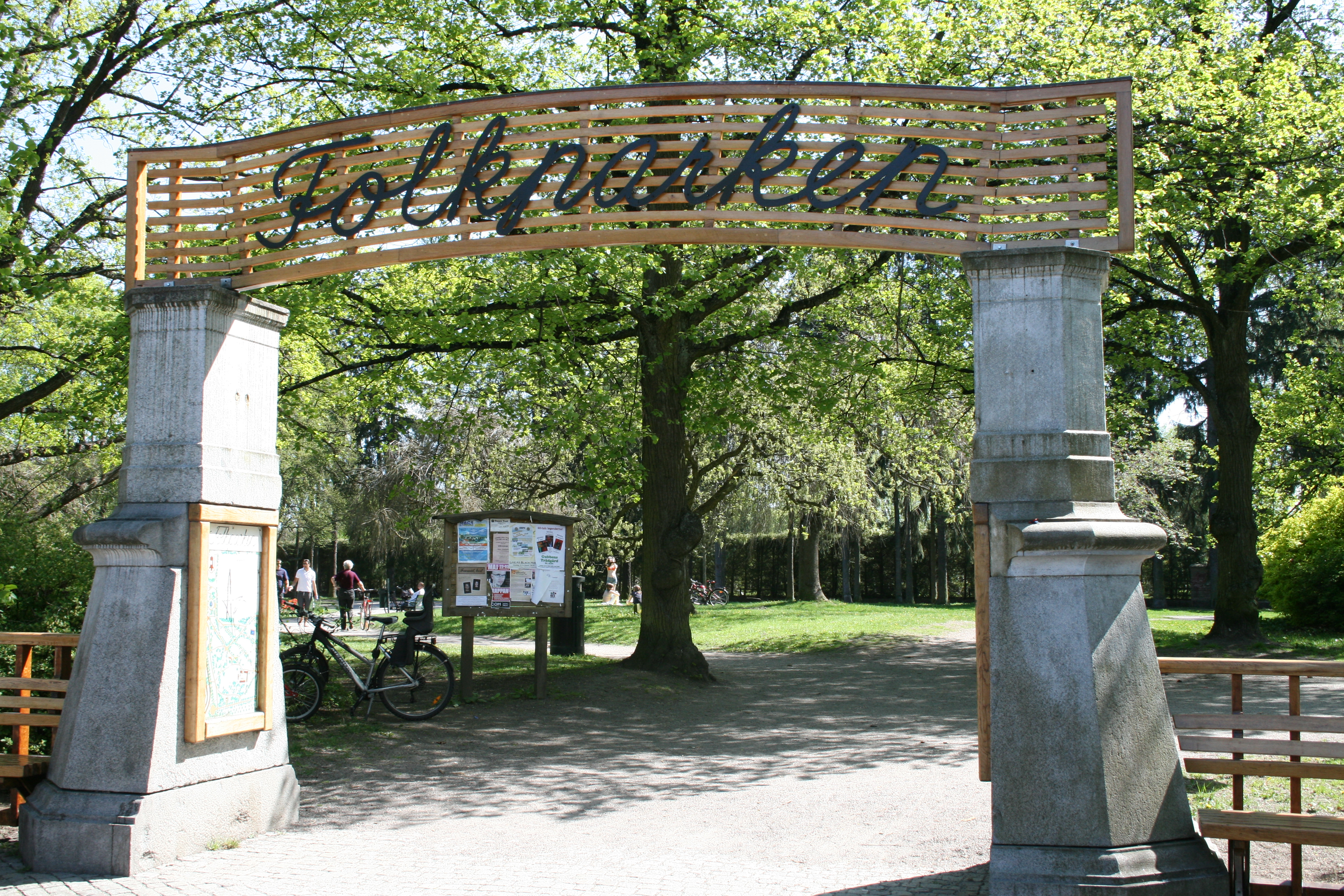 Folkparken i Norrköping 2008-05-10